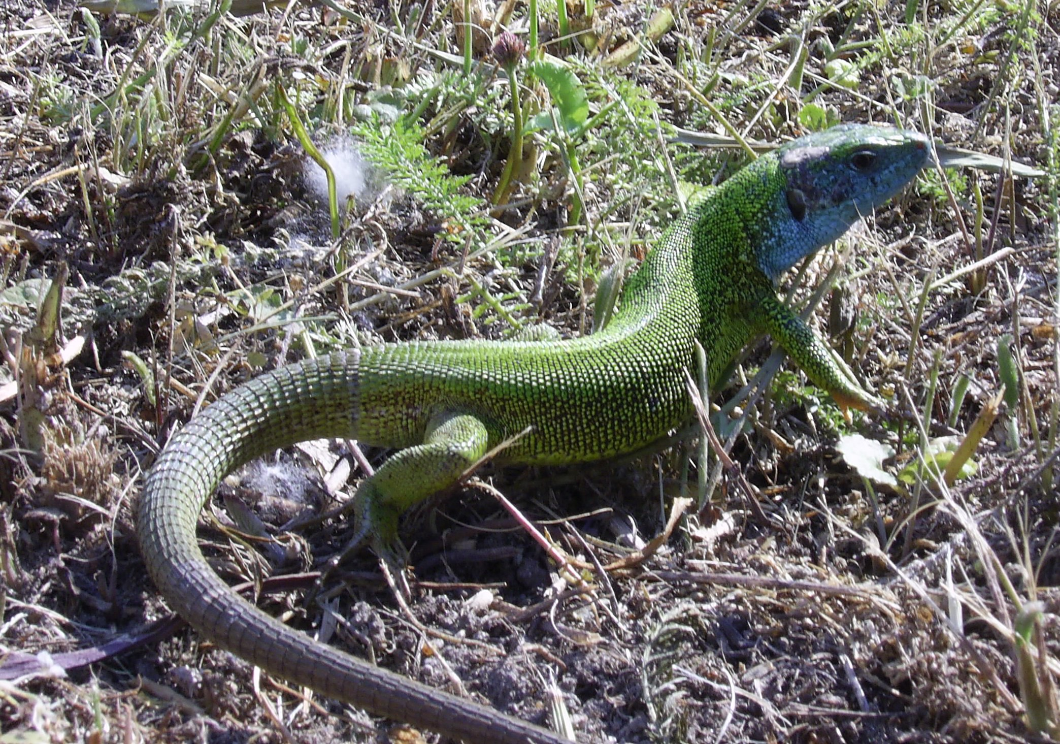 Eine männliche Östliche Smaragdeidechse (Lacerta viridis), aufgenommen in der Burg Devín, Slowakei .